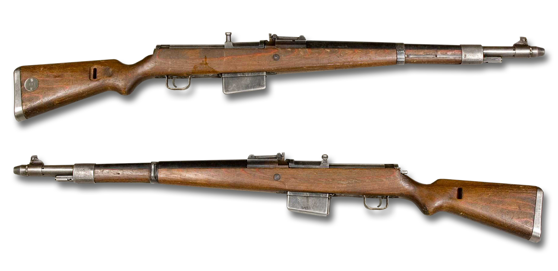 Neue Version des Bildes mit neutralem Hintergrund, entfernten Archivstickern und technischem Schatten.